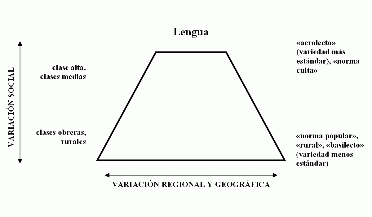 Pirámide que explica las relaciones entre las variedades lingüísticas (dialectos, sociolectos, etc.). Obra propia basada en el esquema que se encuentra en el Manual de dialectología hispánica – El Español de España por Manuel Alvar (Ariel, Barcelona, 2007), página 39.